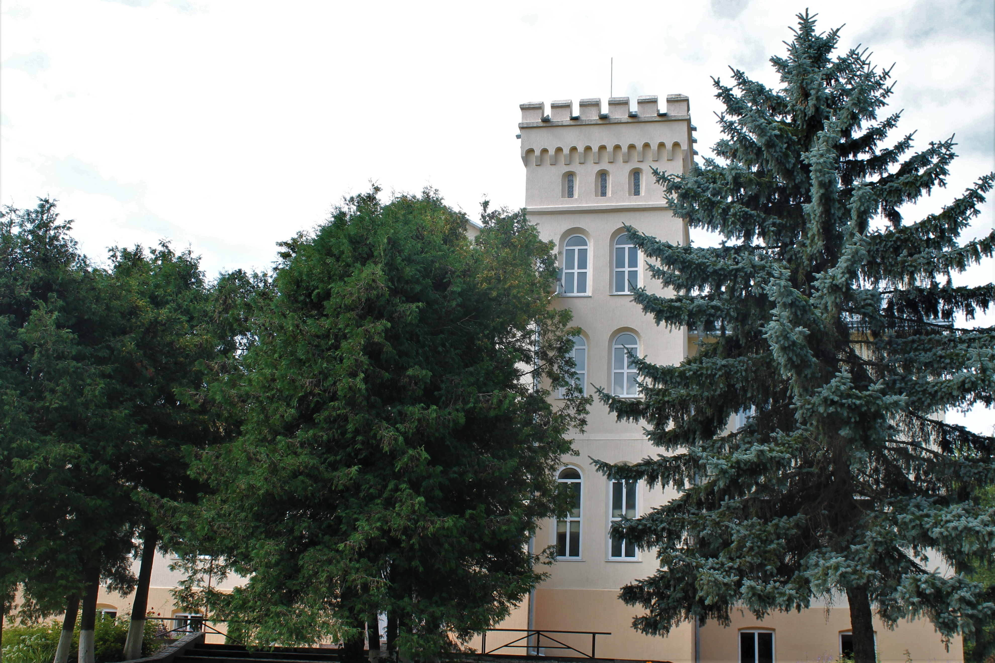 Карапчівський, Вижницький район, с. Карапчів